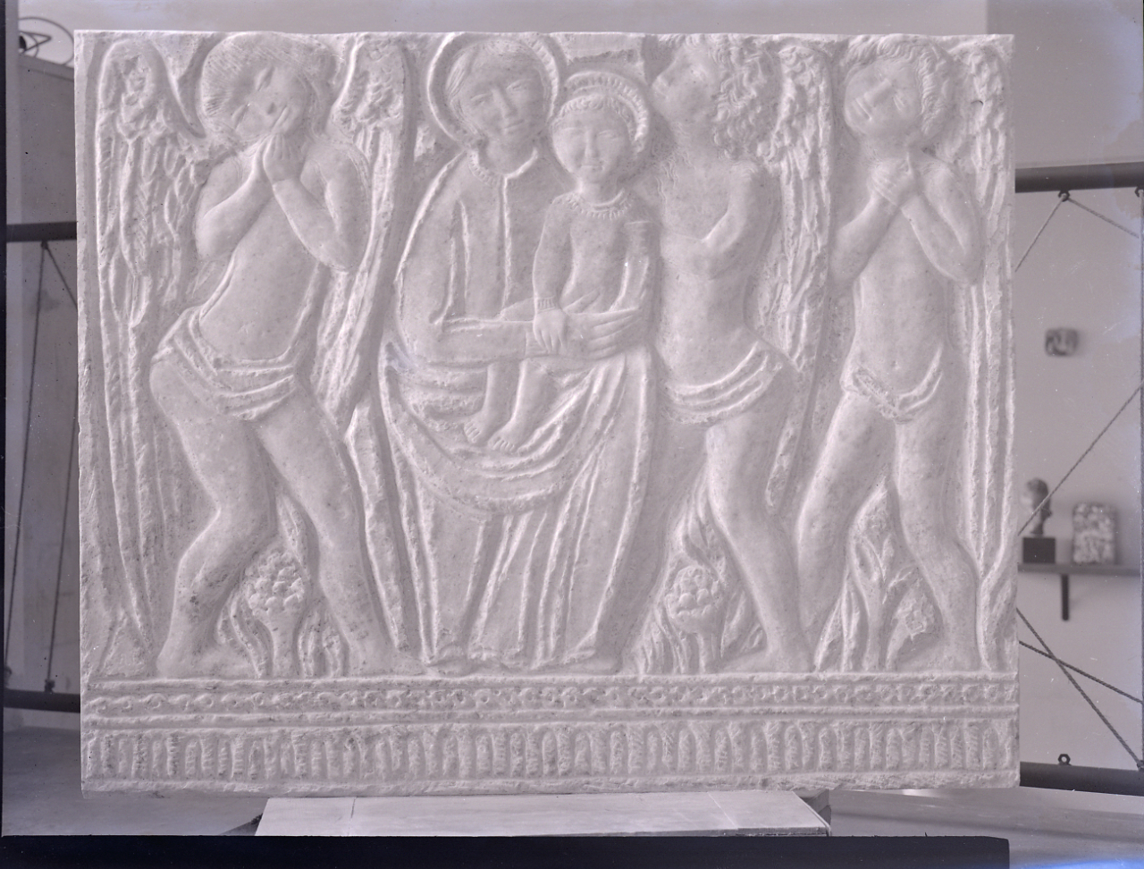 Servizio fotografico : Italia, 1982 / Paolo Monti. - Buste: 8, Fototipi: 8 : Negativo b/n, gelatina bromuro d'argento/ pellicola ; 10x12. - ((Serie costituita da 8 buste di carta, tenute insieme da una graffetta, identificate con i nn.: G4903, G4904, G4905, G4906, G4907, G4908, G4909, G4910. - Sulla busta G4903: "Rui". - Fonte: Quaderno di Paolo Monti: per Mostre: Negative scelte/ vari lavori professionali (s.d.), presso Archivio Paolo Monti